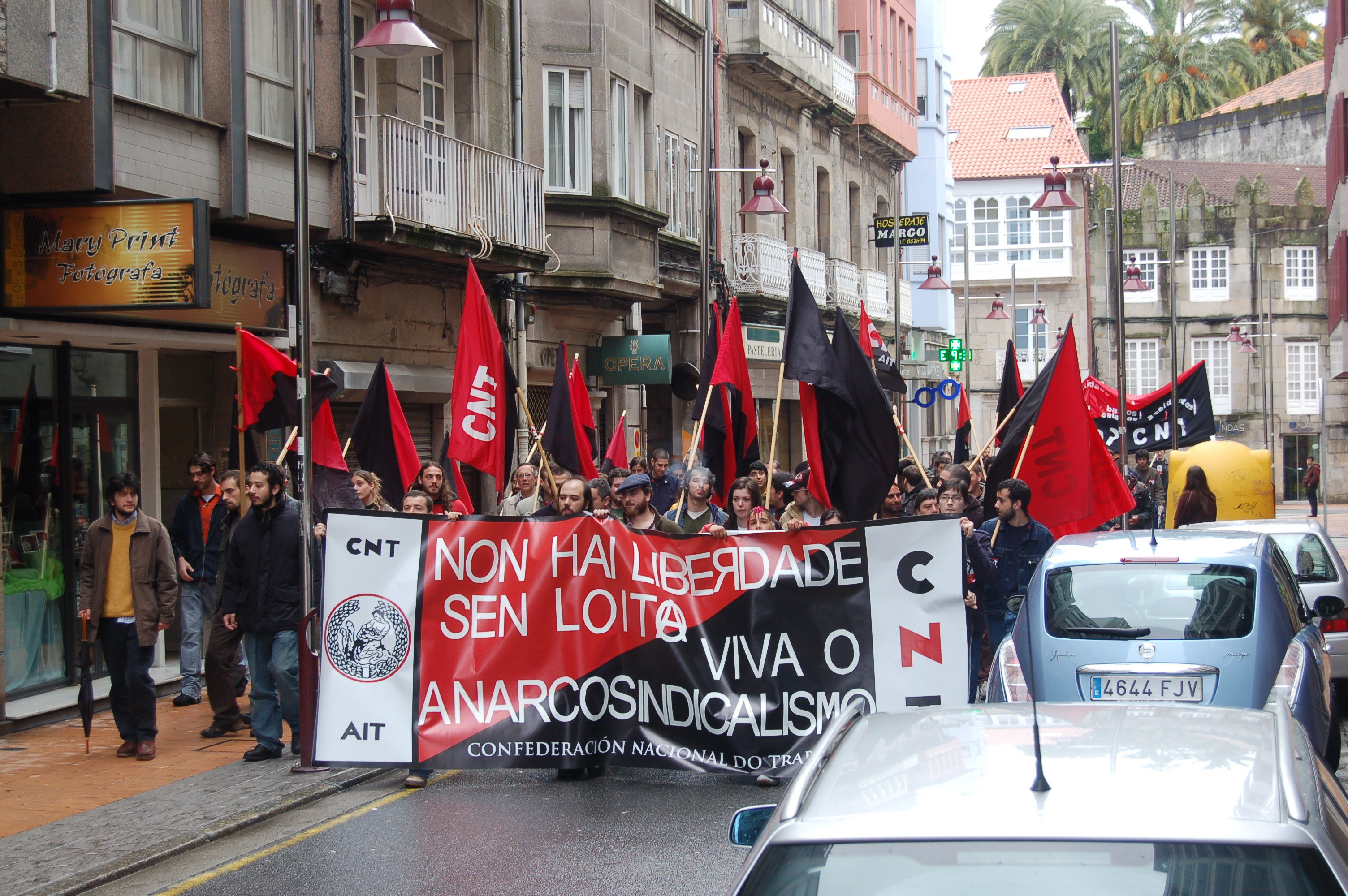 Manifestación da Confederación Rexional Galega polo 1º de maio de 2008, en Pontevedra